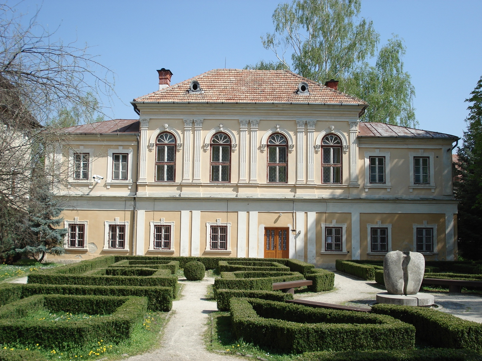 Kaštieľ v Brodzanoch